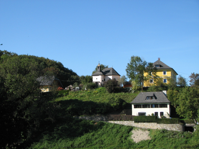 Gesamtanlage, Ehemaliges Schloss Radeck mit Schlosskapelle